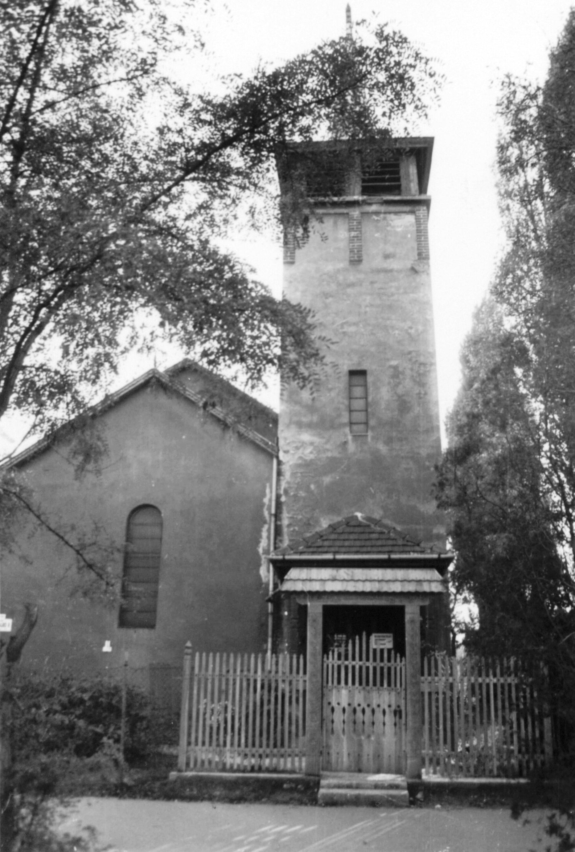 Állami lakótelep unitárius templom